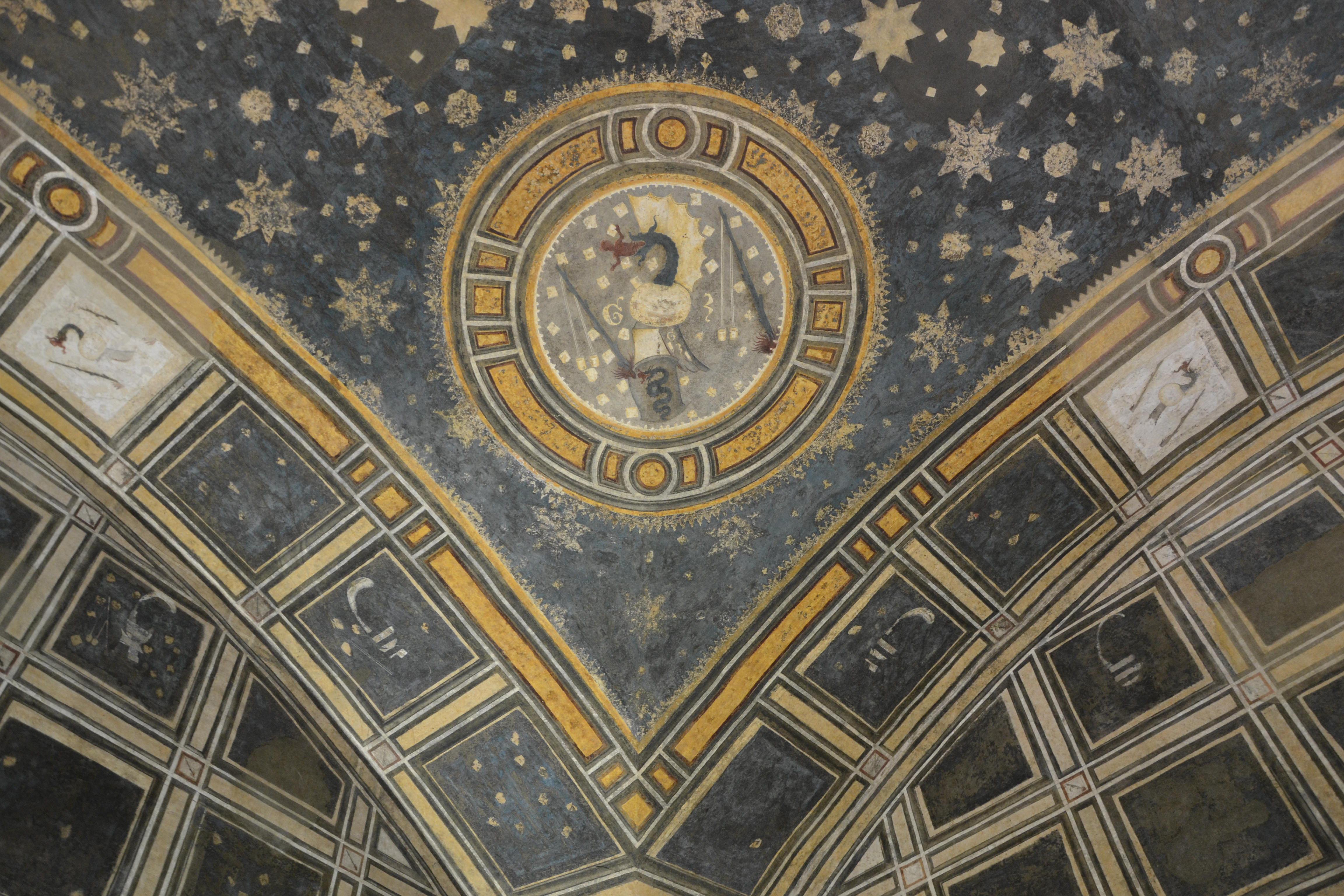 affreschi della Sala Azzurra del Castello Visconteo